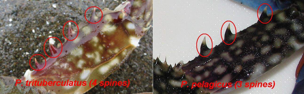 ガザミ(雄)の鋏脚長節